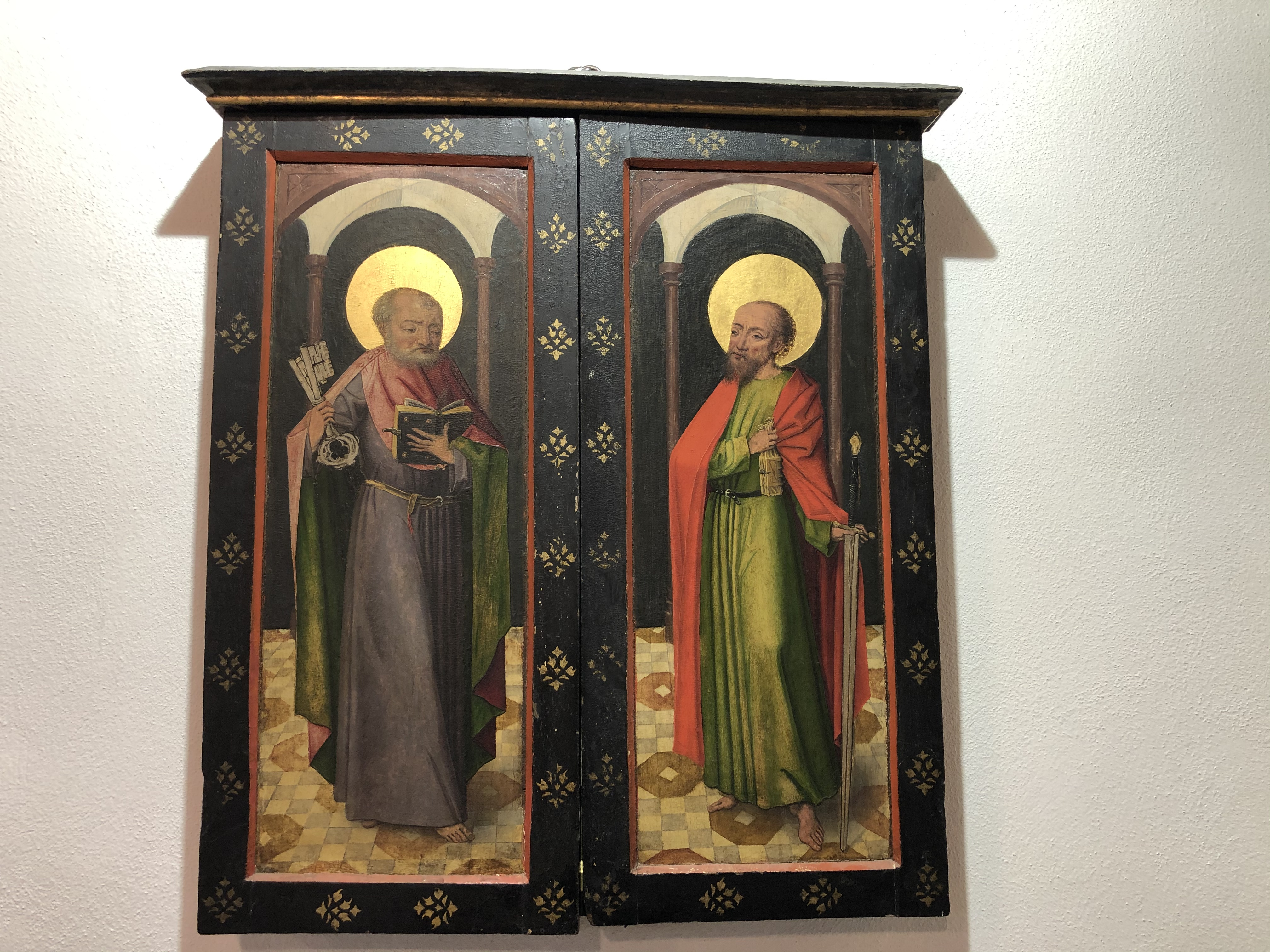 Beweinung Christi Flügel Petrus und Paulus Bad Münstereifel